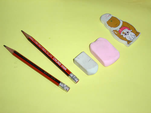 各種橡皮擦。相片由本人拍攝，所有橡皮擦亦由本人擁有。